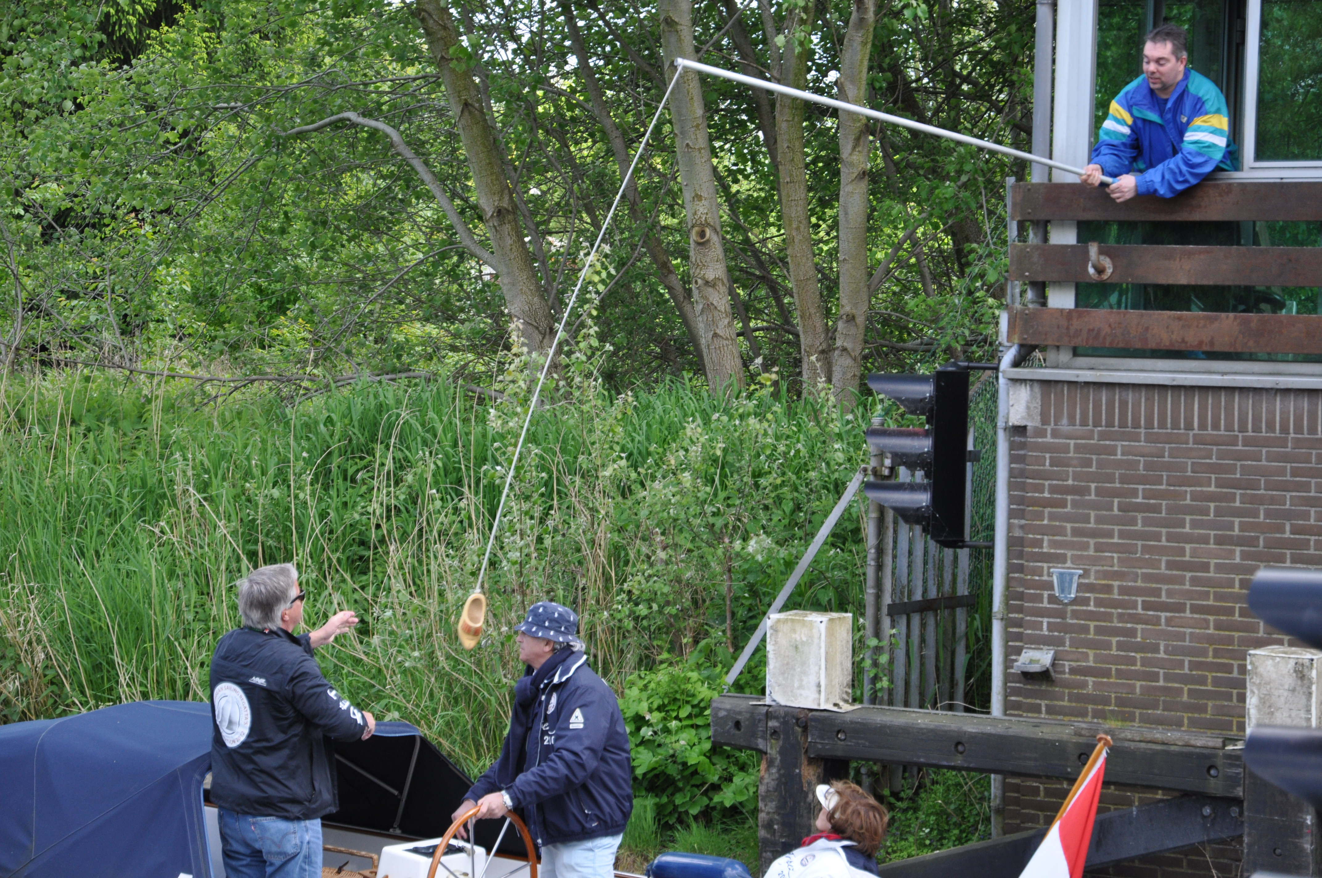 De brugwachter int het tolgeld met een klomp bij de brug over de Hollandse IJssel in Oudewater.